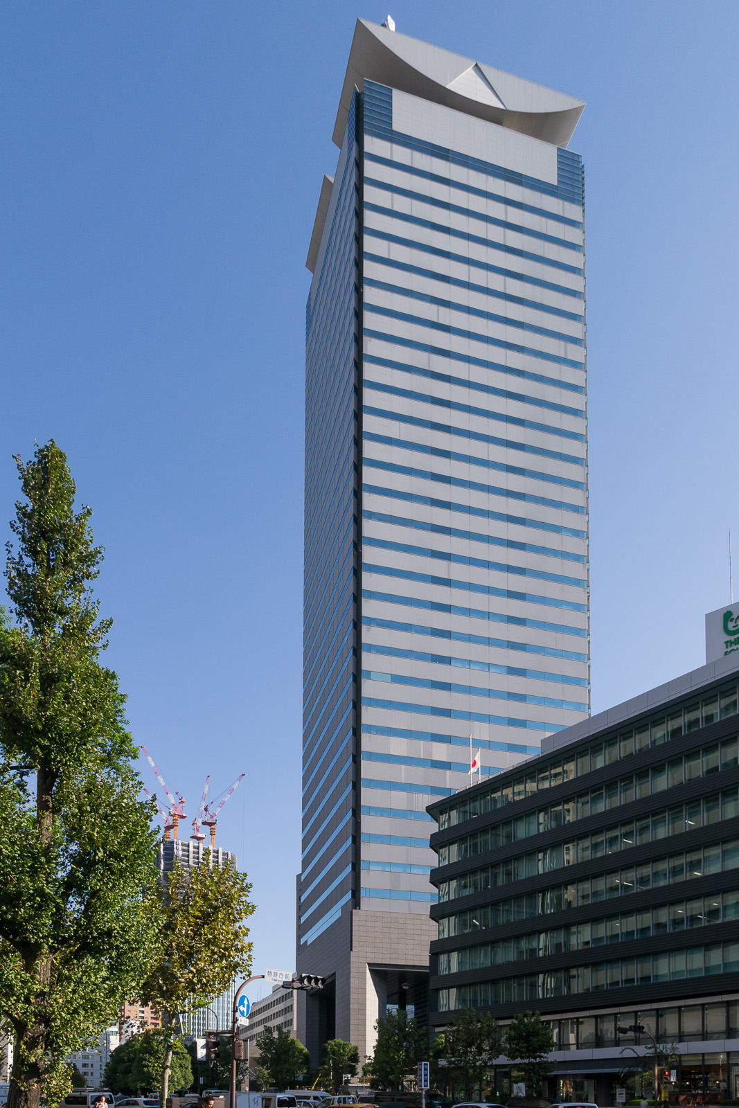 JTビル（日本たばこ産業本社ビル）、東京都港区虎ノ門2-2-1。